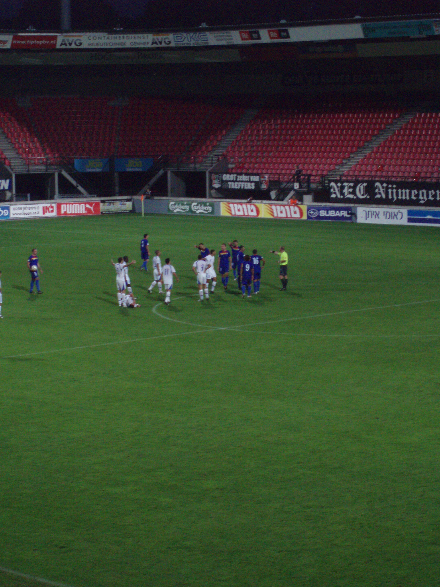 Football match in Nijmegen Israel-Andorra